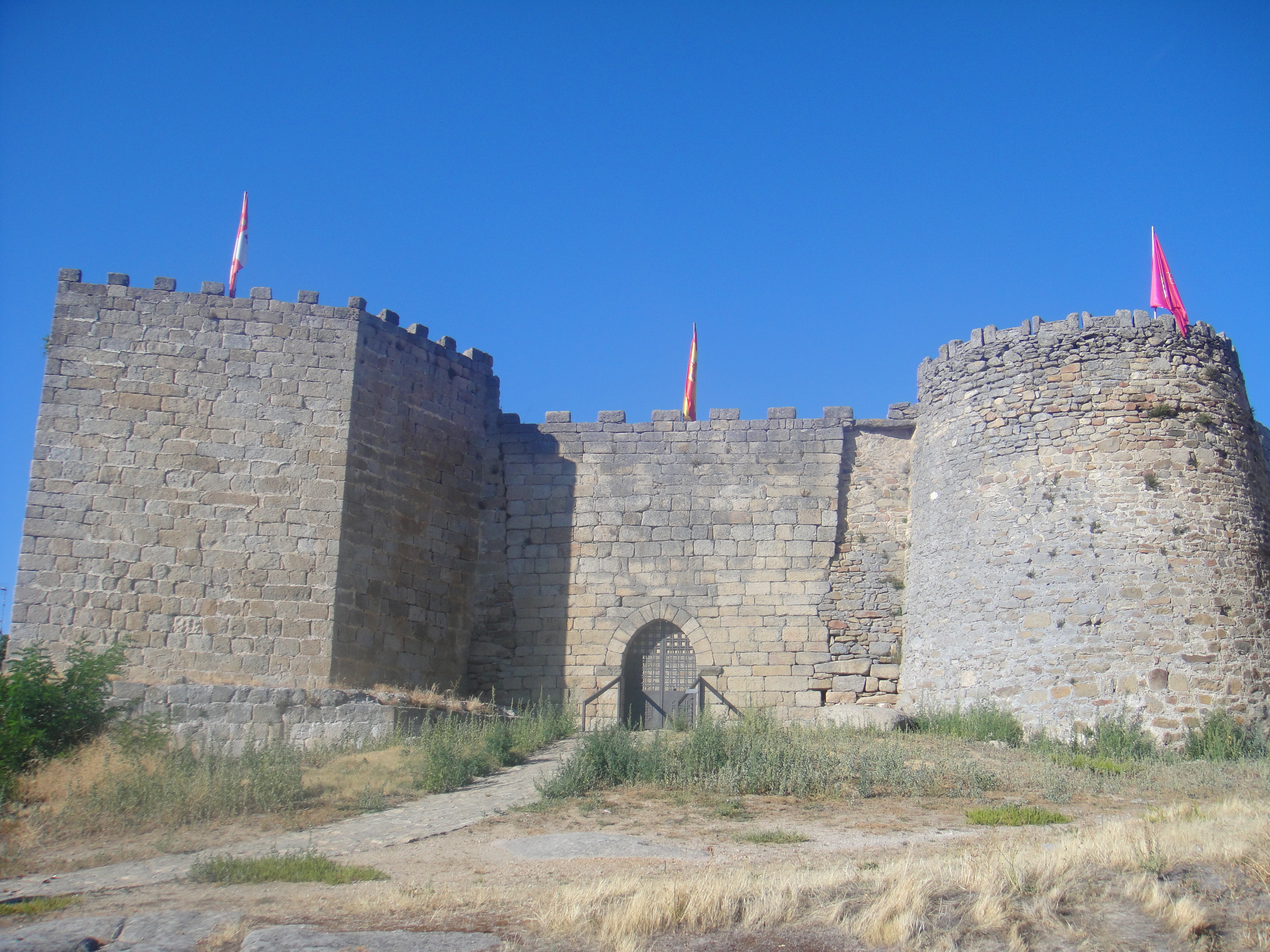 Entrada principal del castillo de Ledesma, construído en la Edad Media. Se encuentra en la provincia de Salamanca, (España).